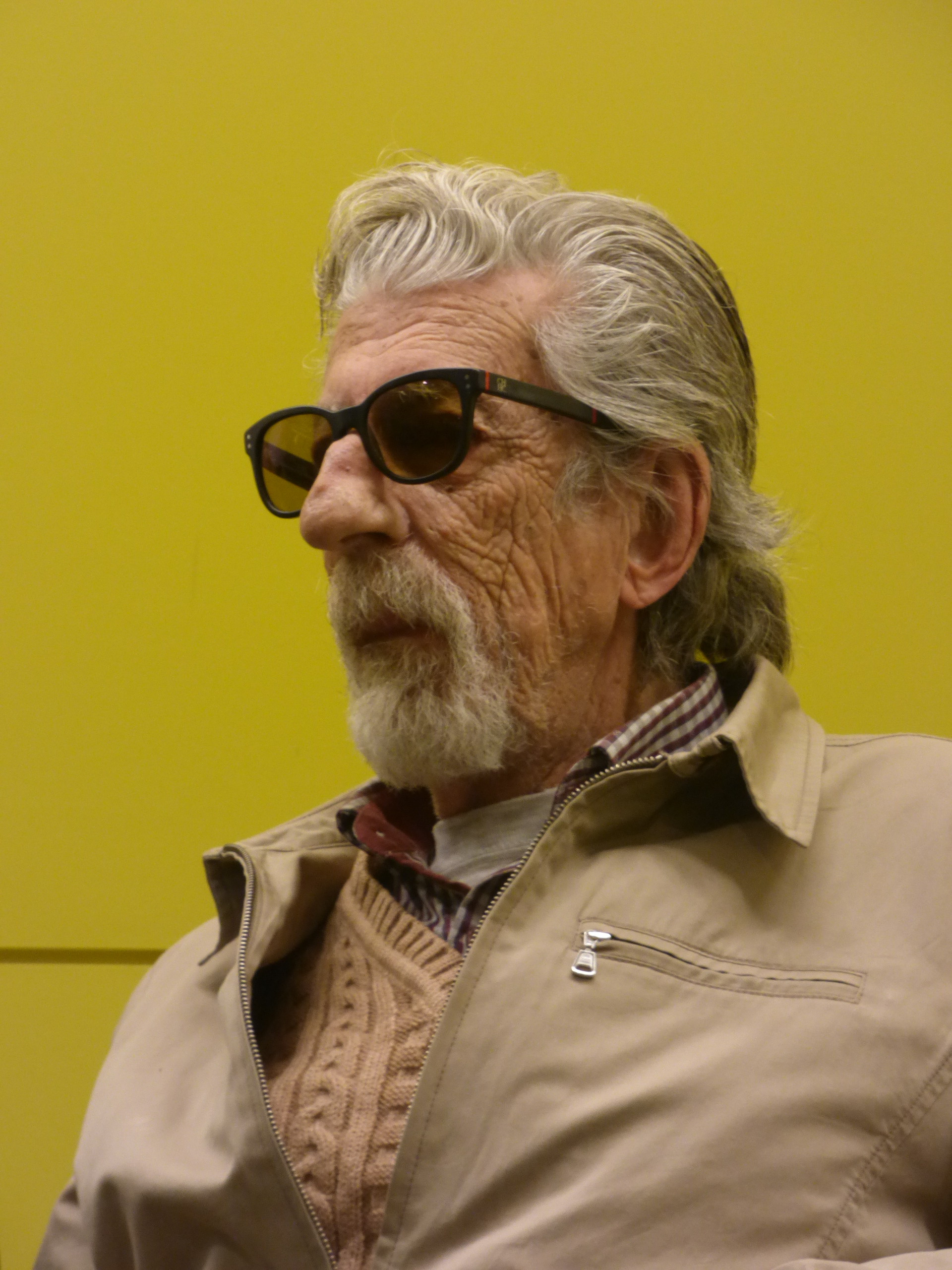 Francesc Burrull el 2018